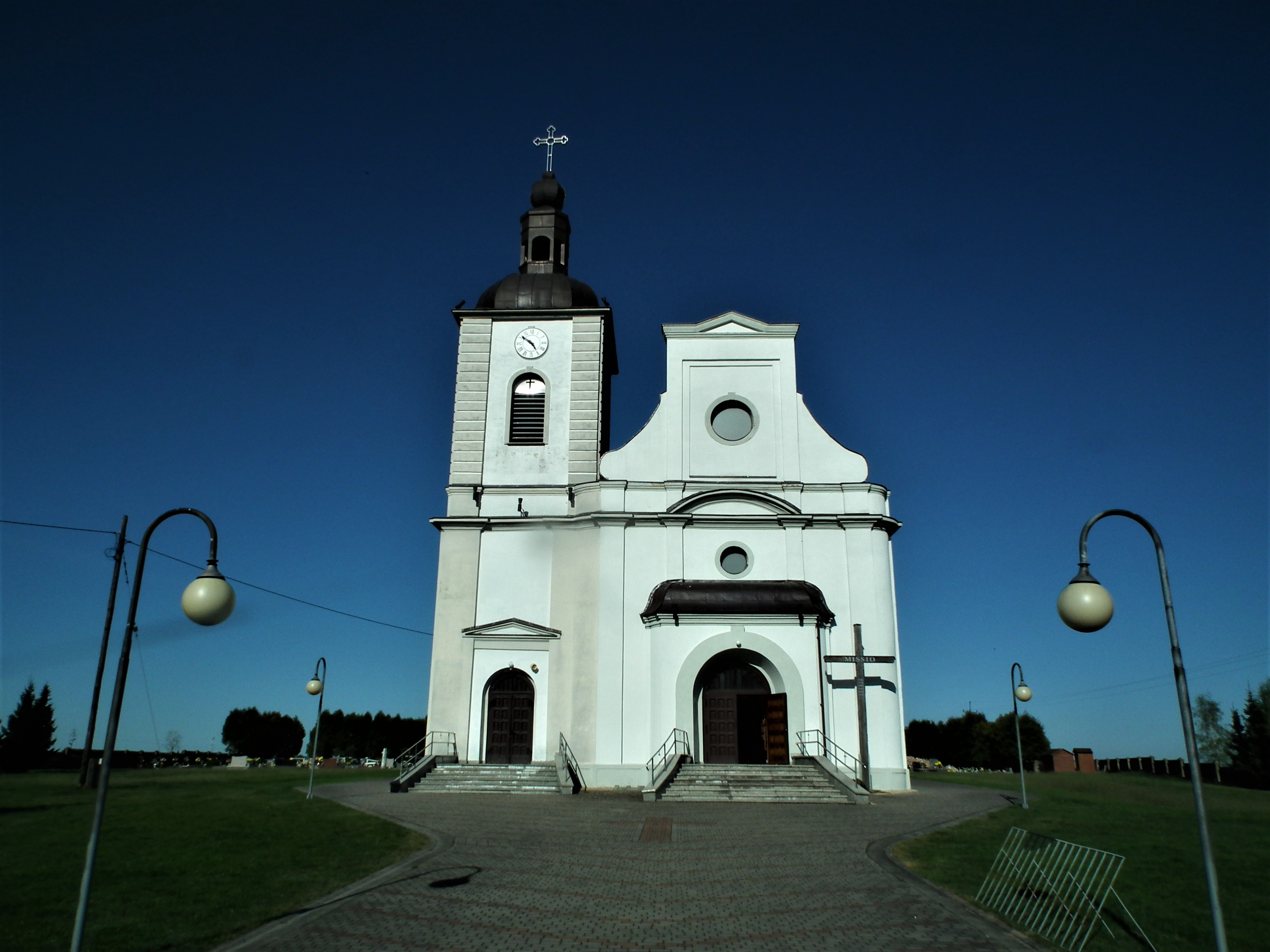 Kościół św. Jadwigi w Jeżowej.